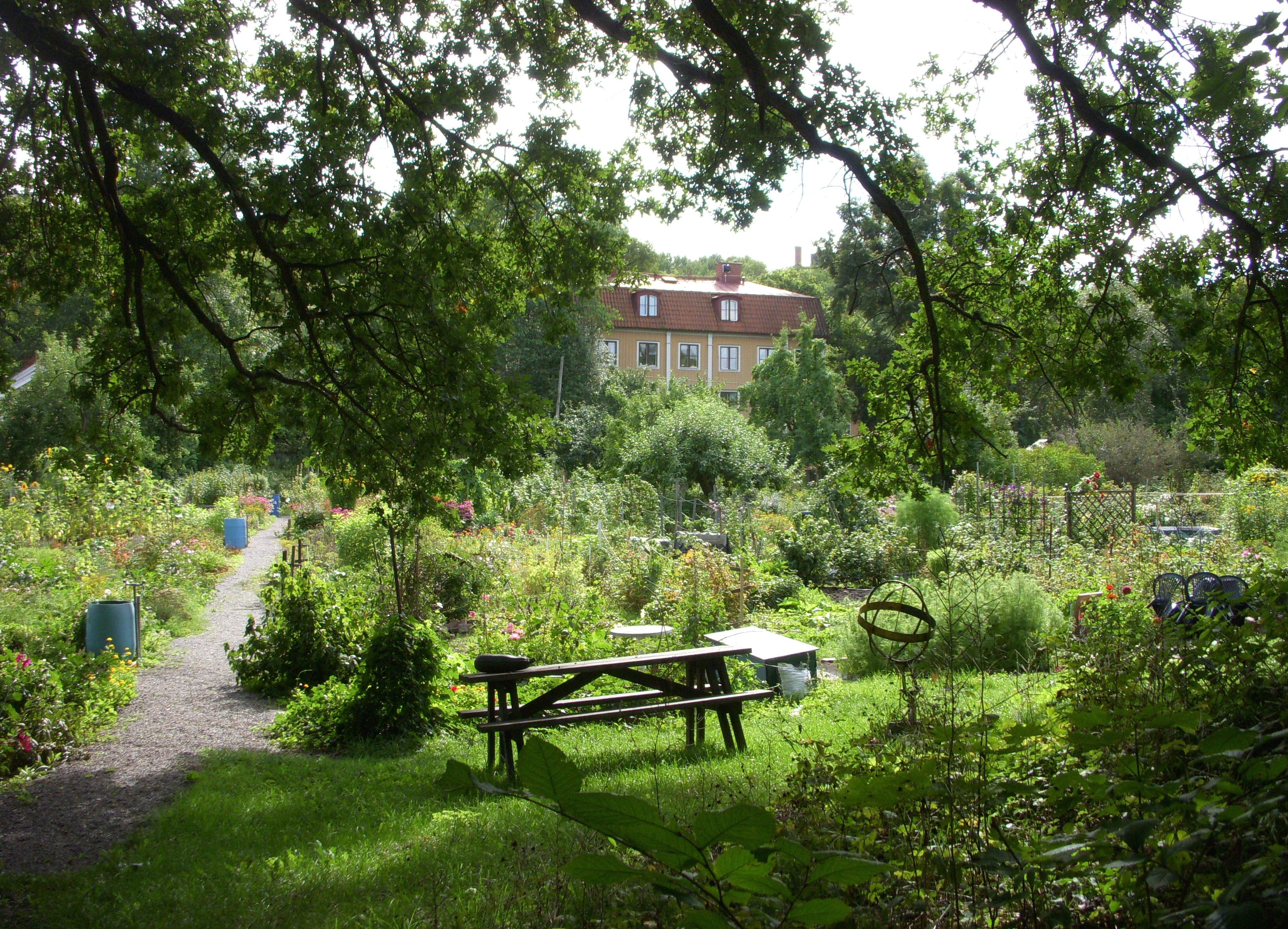 Johannelunds koloniträdgård